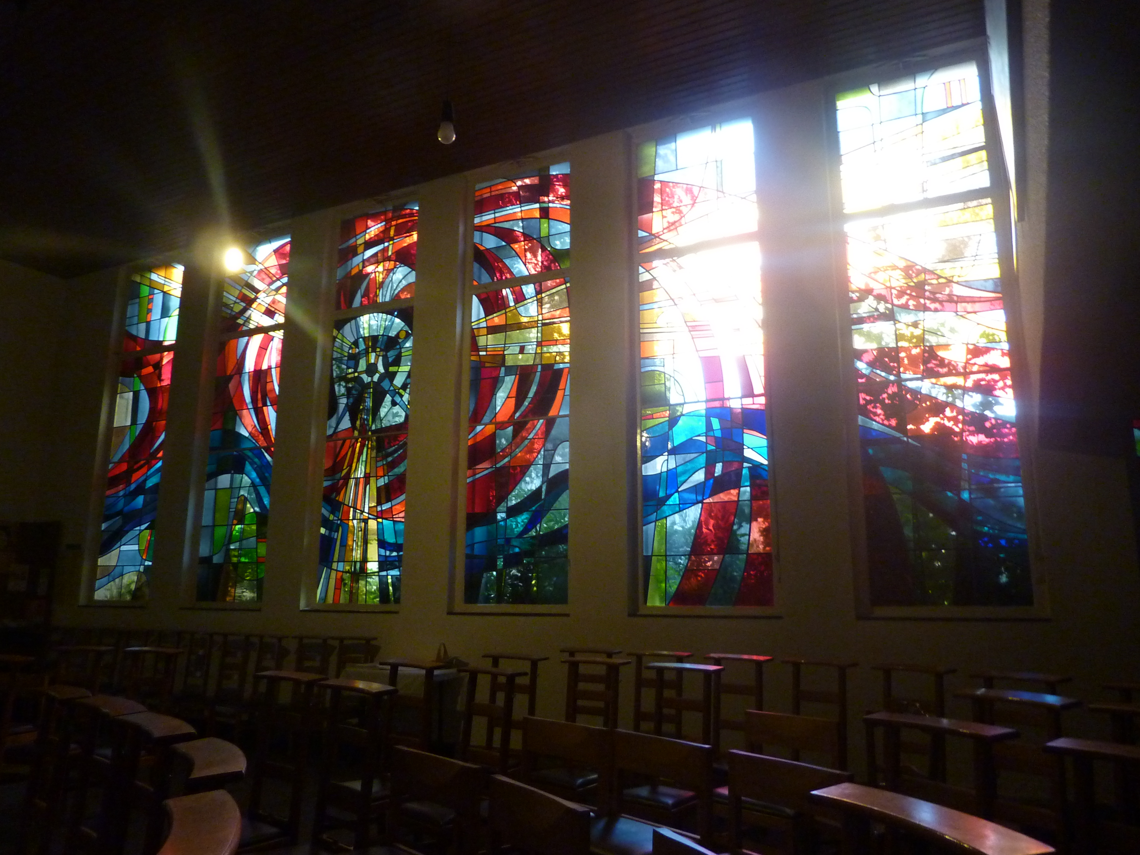 Vitrail de la chapelle de l'église du Divin Sauveur à Schaerbeek, Bruxelles, Belgique.